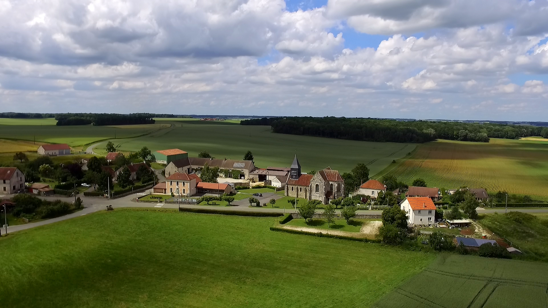 Vue aérienne du centre du village de Montolivet. A gauche de l'église, la Mairie.